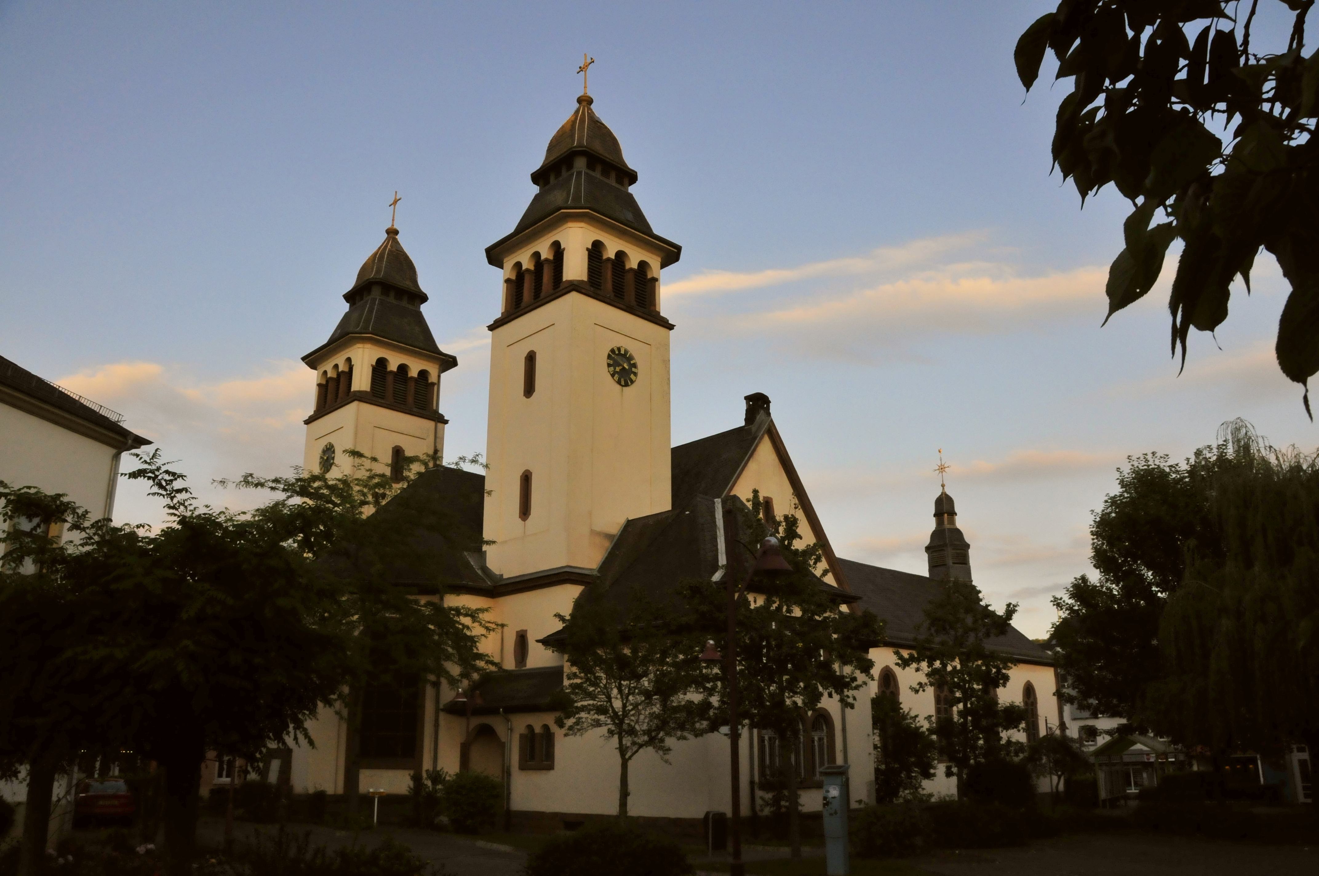 Wasserbillig, Kirche